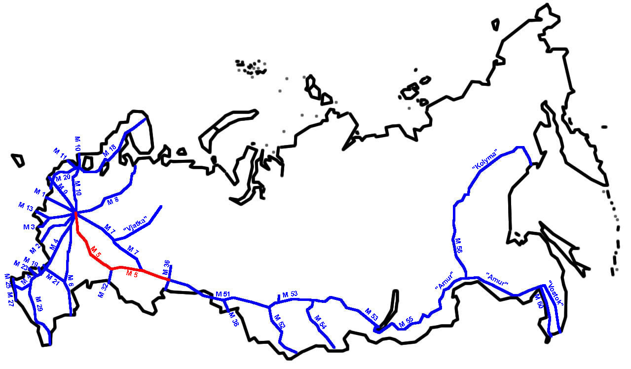 M5 im russischen Fernstraßennetz